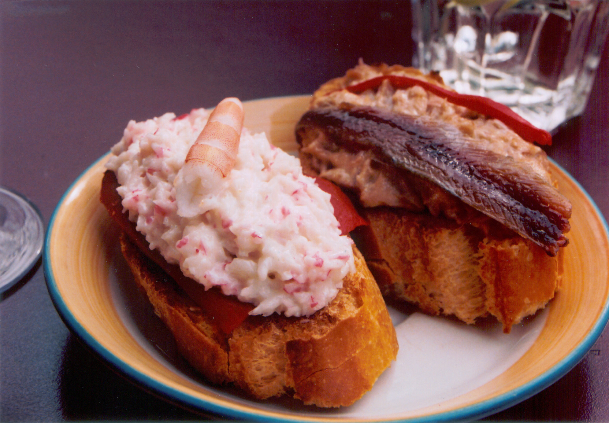 Plato con dos pinchos: txaka (cangrejo/surimi) y gamba (izquierda), bonito y anchoa (derecha), ambos con pimientos rojos, servidos en Vitoria-Gasteiz (País Vasco). Taken by myself, october 2005. --Ardo Beltz 12:53, 13 November 2005 (UTC)